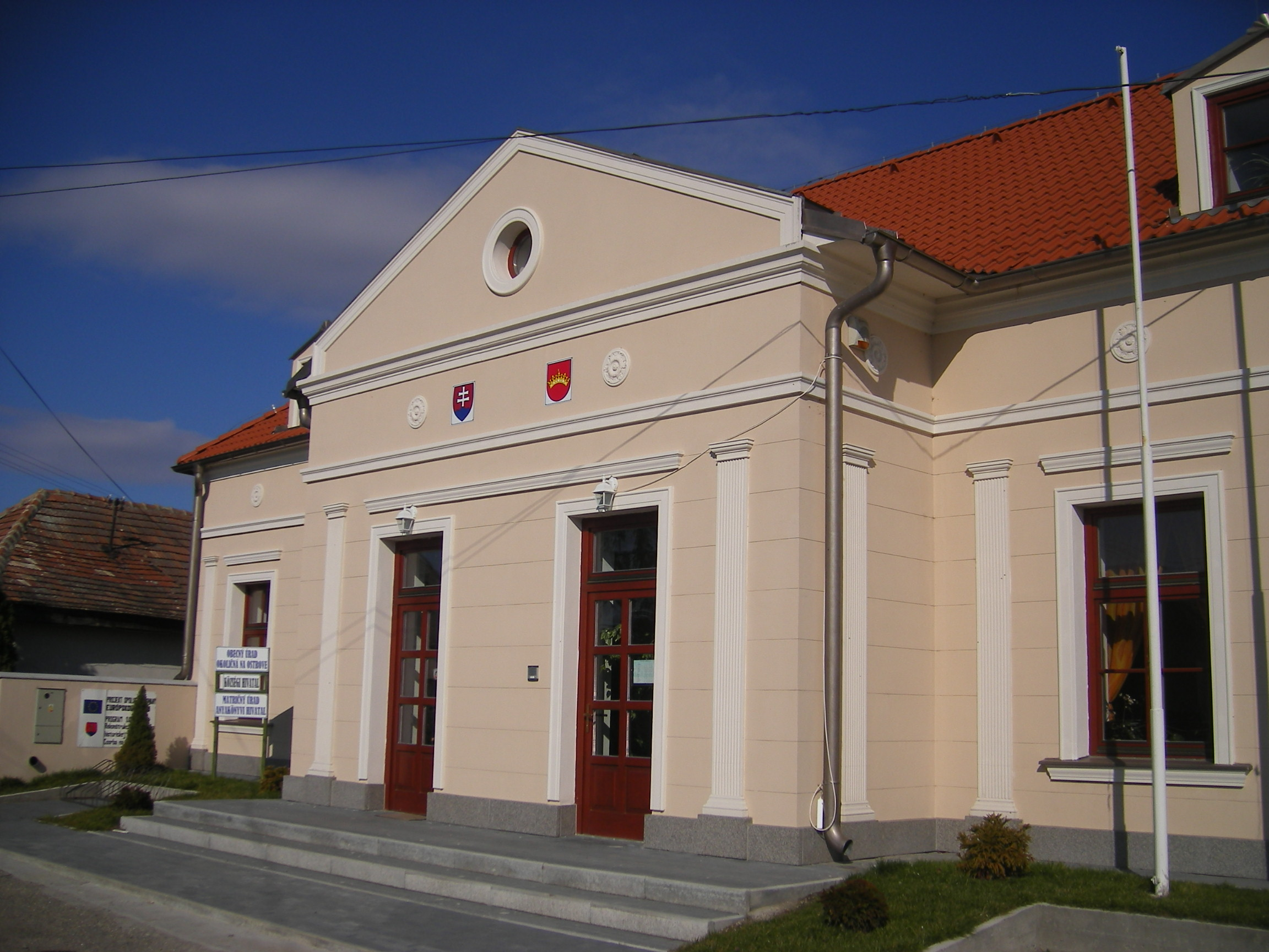 Okoličná na Ostrove - obecný úrad; Ekel - községi hivatal